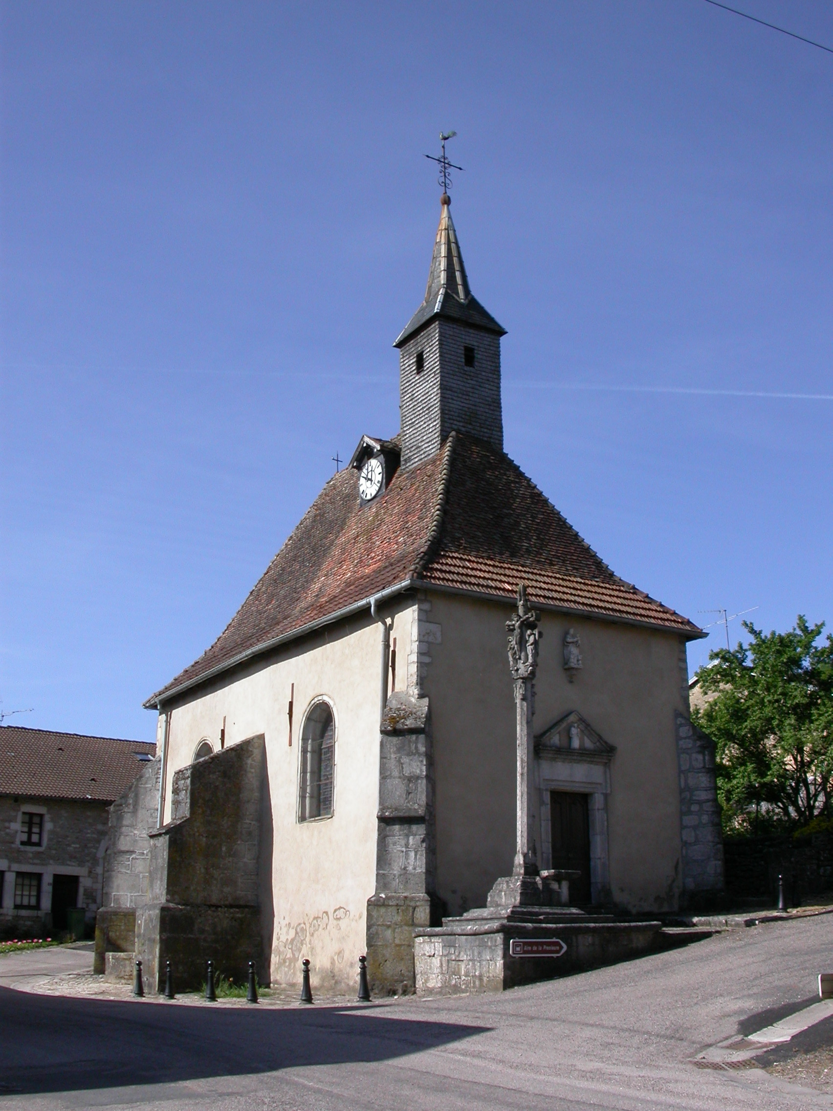 église de Dolaincourt inscrite MH et calvaire classé MH